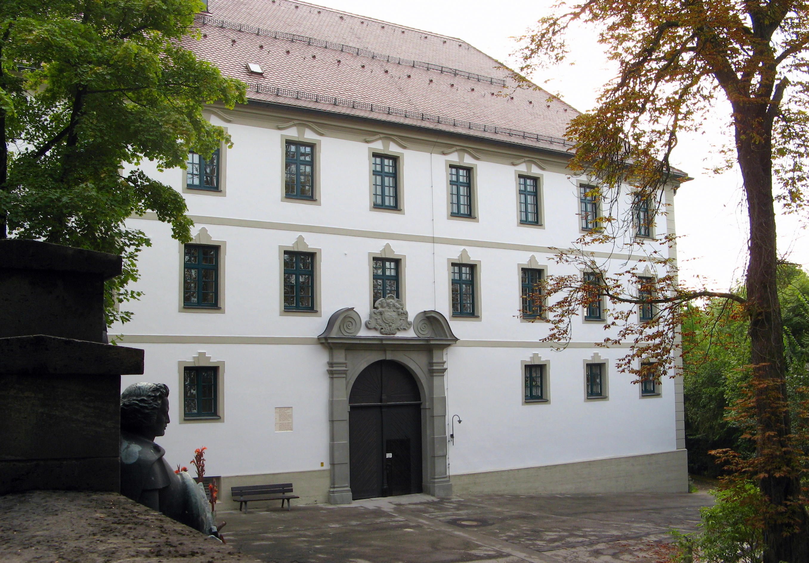 Johann Georg Fischer, Westflügel des Schlosses in Marktoberdorf